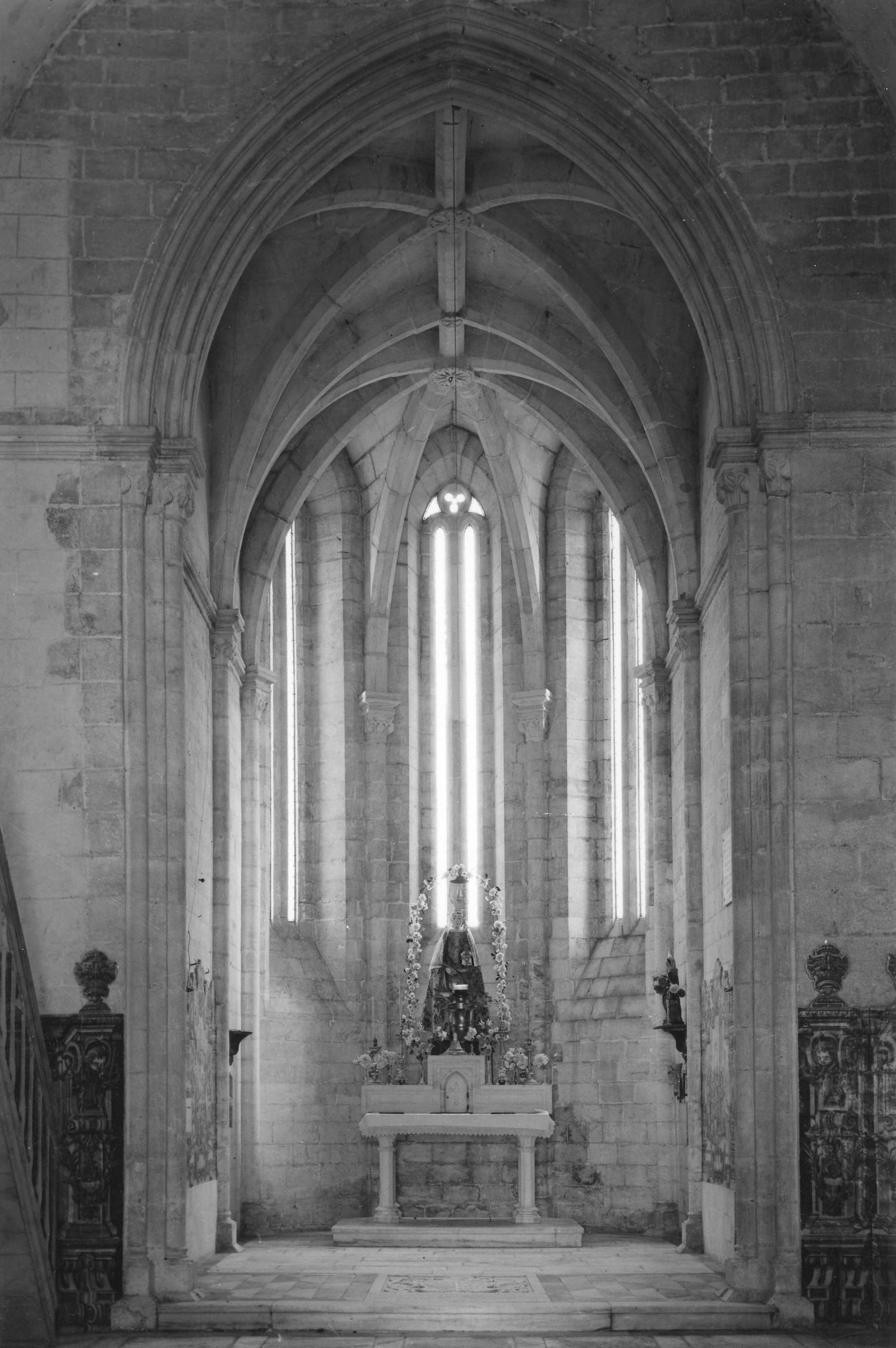 Ábside gótica. Fotógrafo: Mário Novais, 1899-1967. Orientador científico: Mário Tavares Chicó, 1905-1966. Data aproximada da produção da fotografia original: 1954. [CFT015.061.ic]